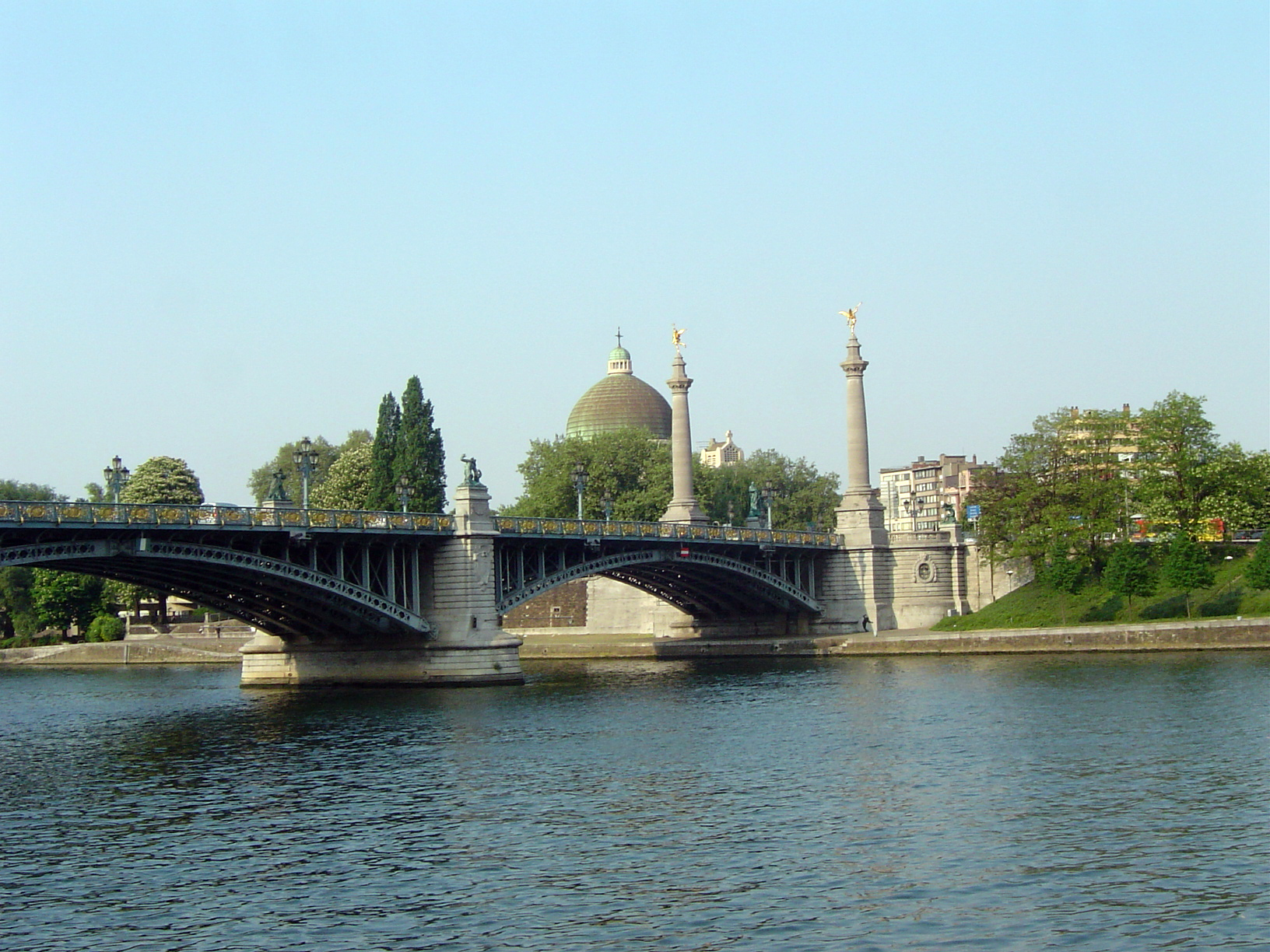 Pont de Fragnée - Liège